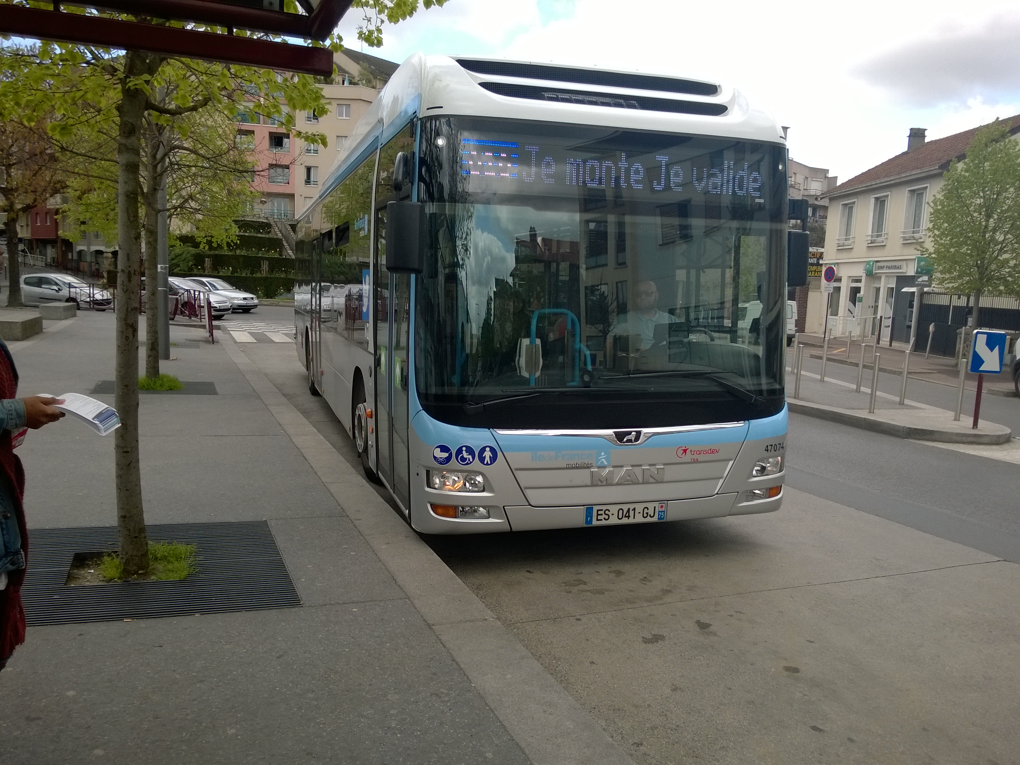 En livrée Île-de-France Mobilités, un MAN Lion's City hybride à l'arrêt Gare de Bondy.